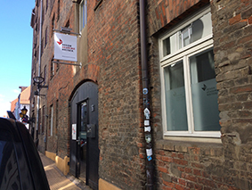 Straßenansicht der Designakademie_Rostock